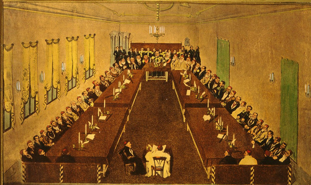 lithograph labeled "L'ouverture de l'assemblée Générale de révision à Bucharest (sic!), le 10/22 Mars 1831"